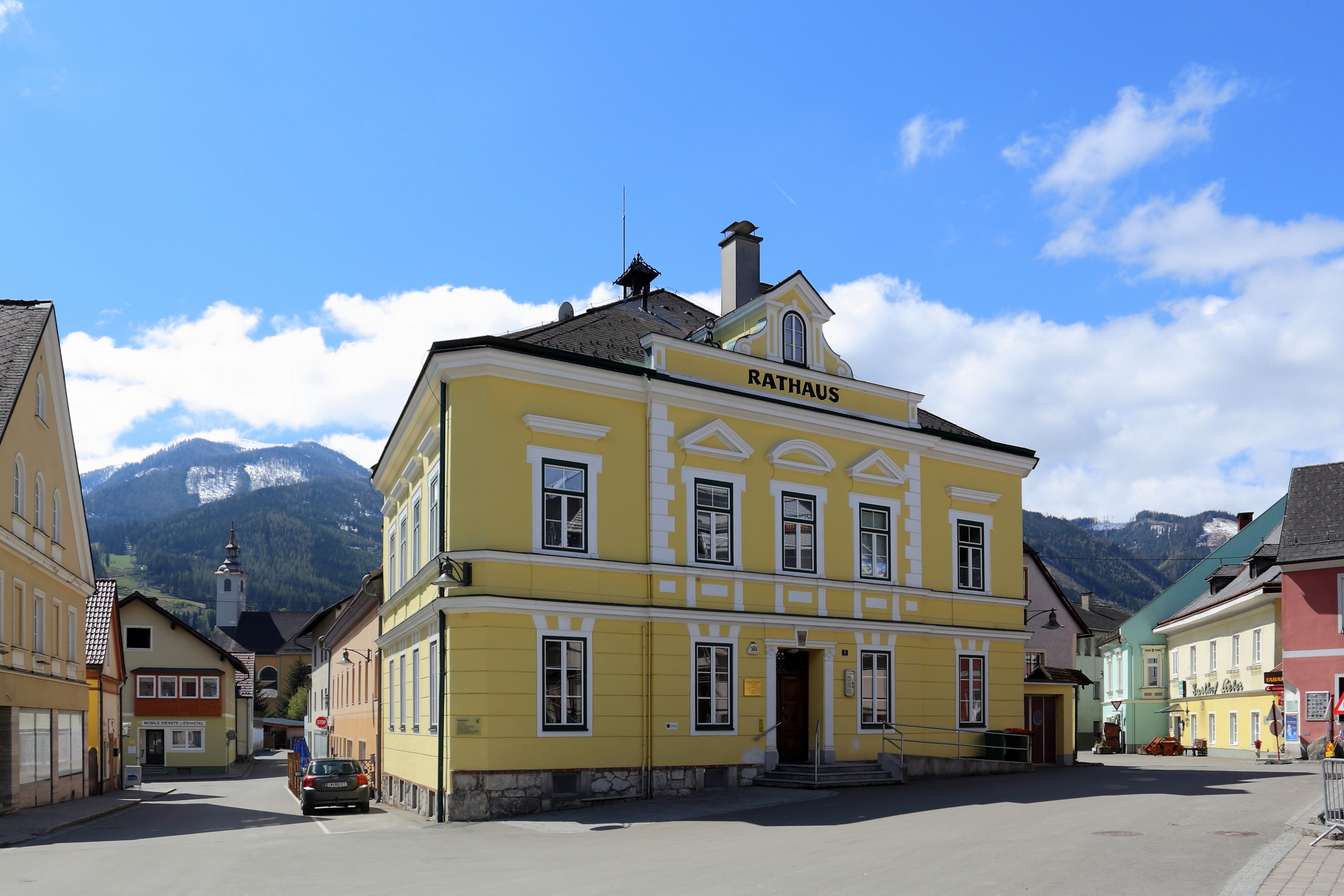 Das ehemalige Rathaus der steiermärkischen Marktgemeinde Mautern.